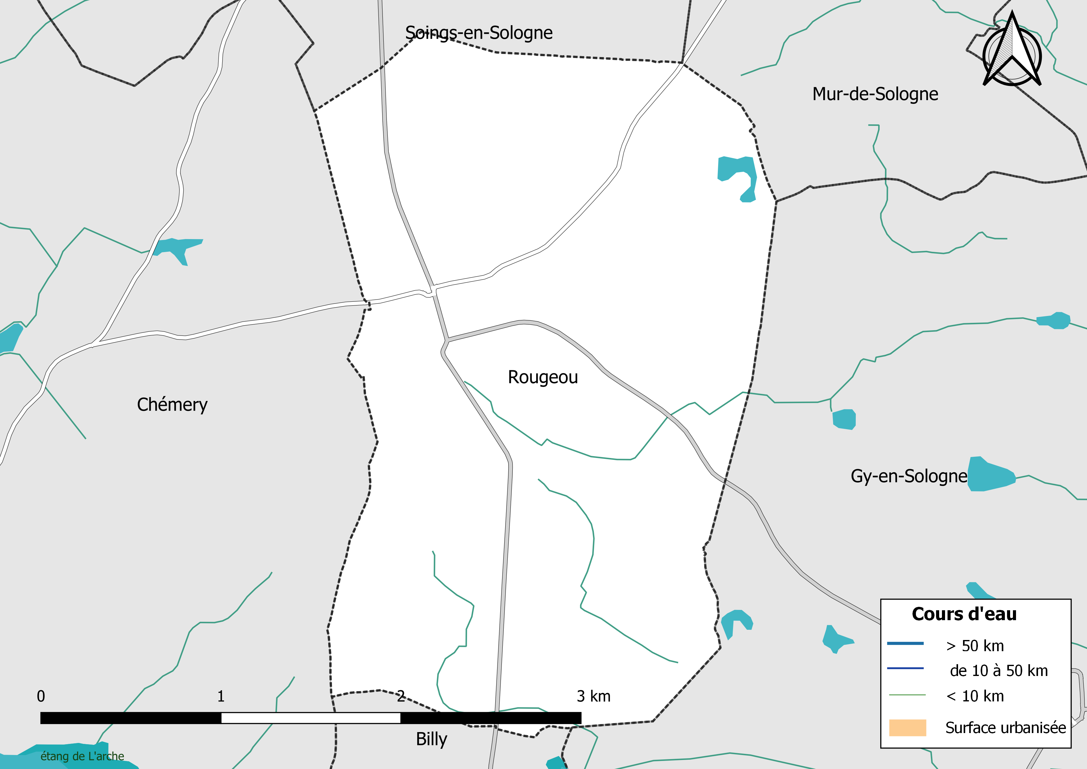 Carte du réseau hydrographique de la commune de Rougeou (Loir-et-Cher, France).